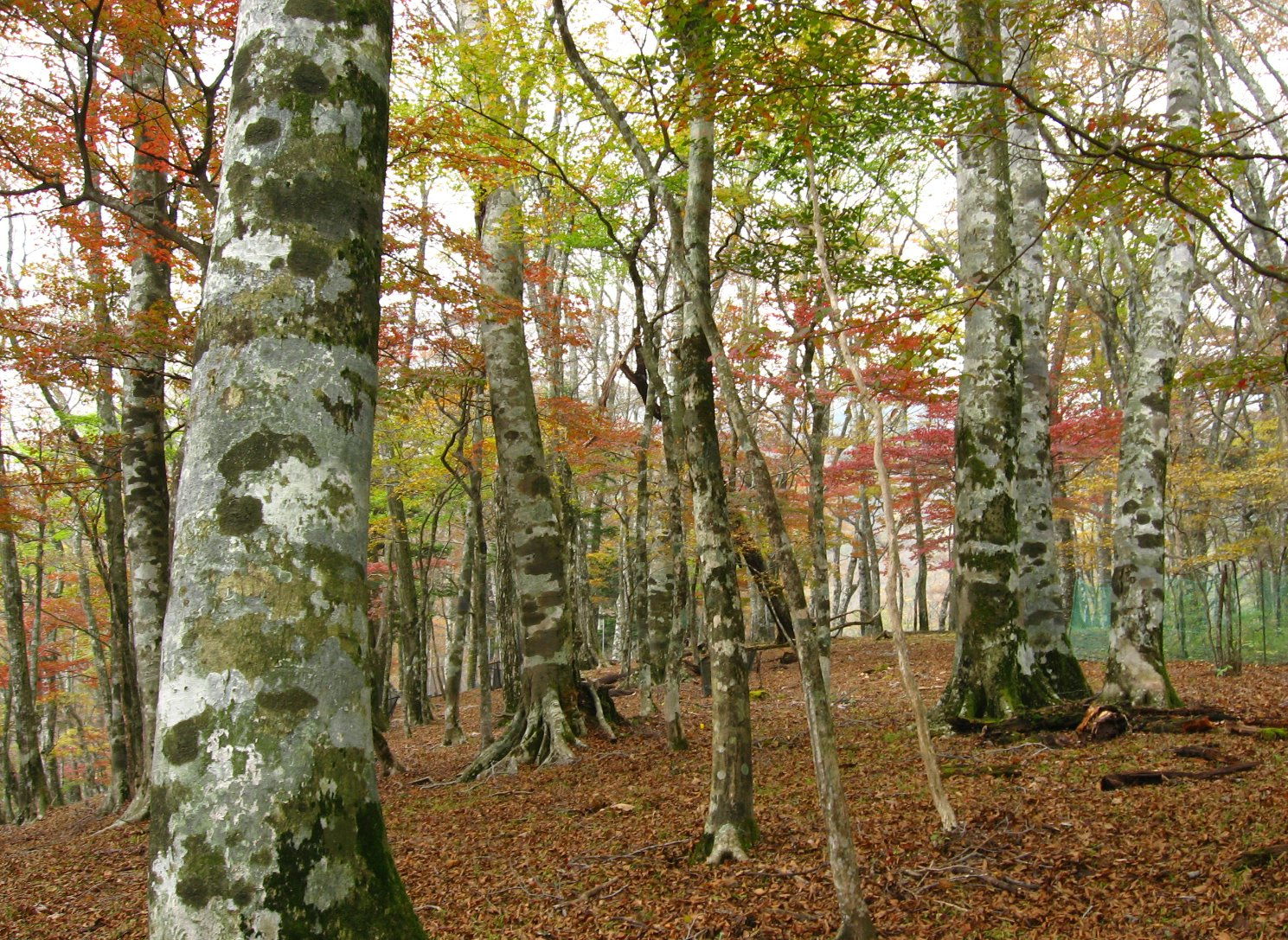 ブナ林